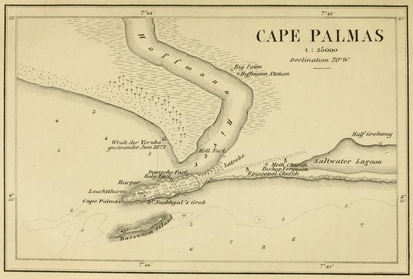 Vol.1 Map